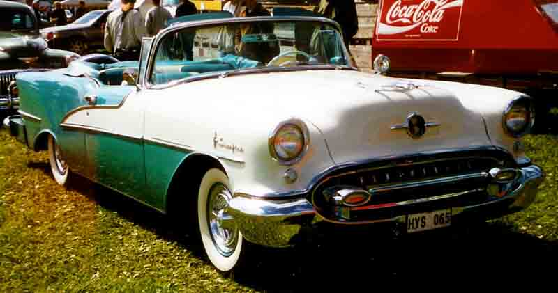 Oldsmobile 98 Convertible 1955